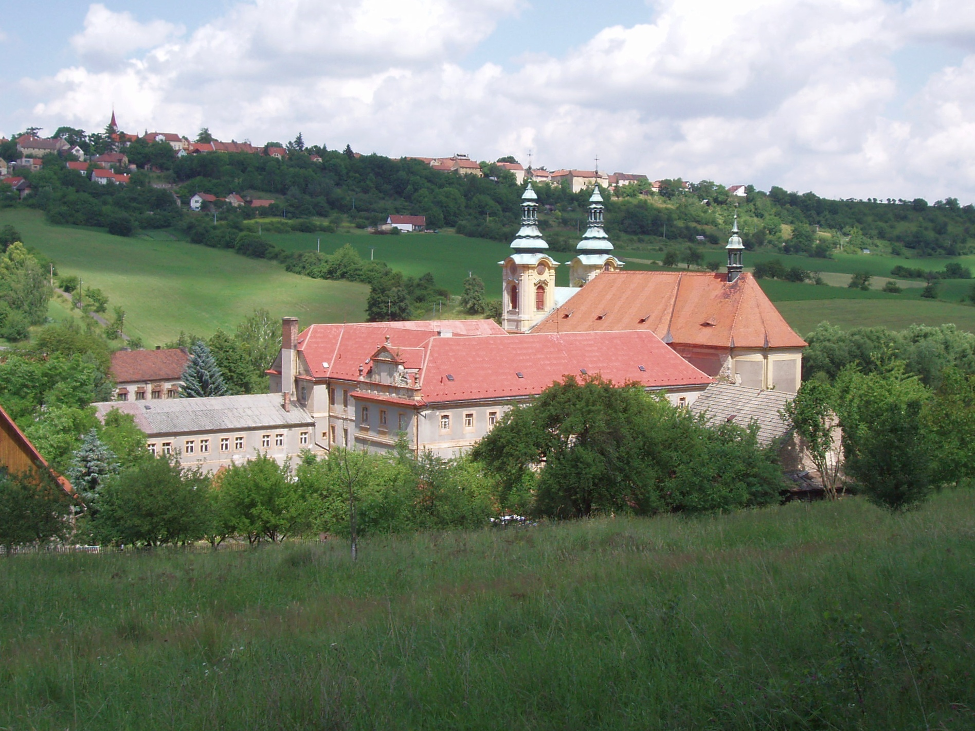 Ročov monastery